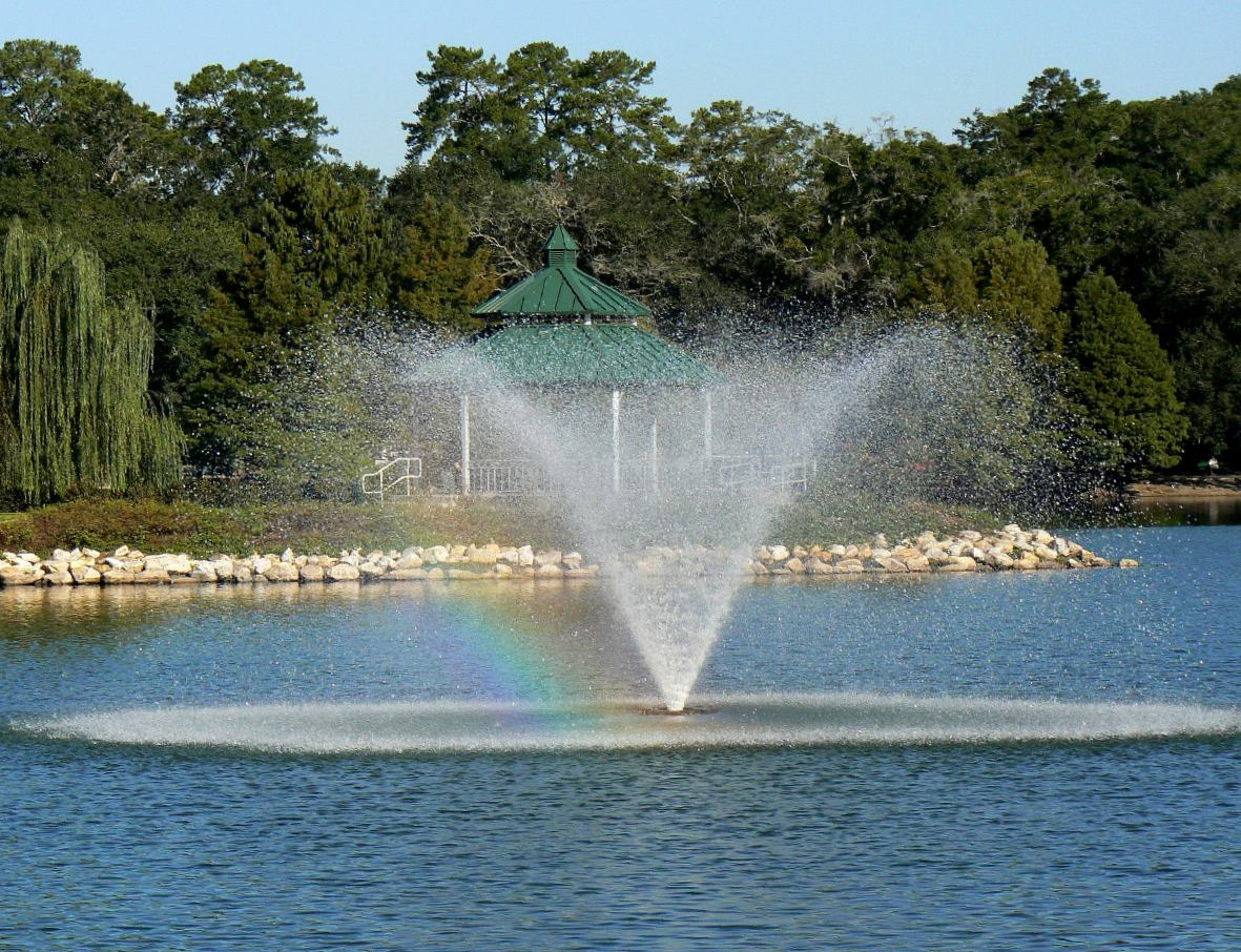 Lake Ella, Tallahassee FL, USA